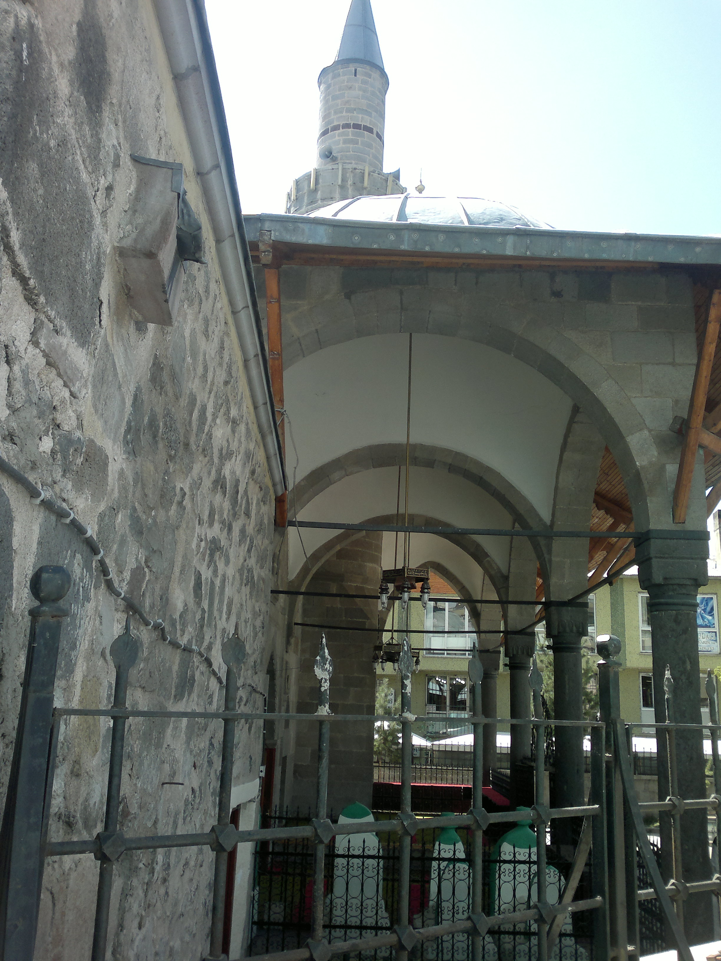 Erzurum Caferiye Camii